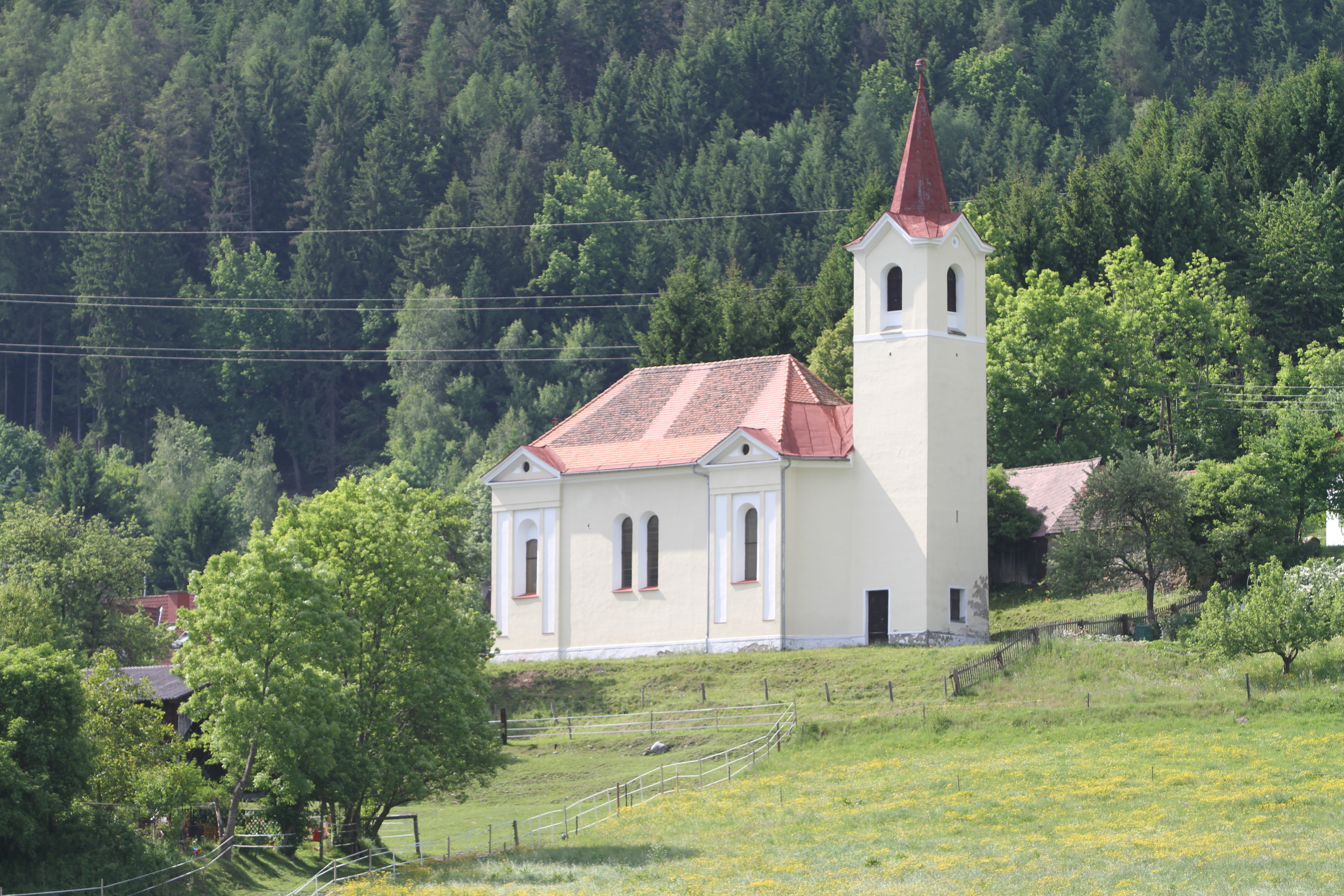 Kath. Filialkirche hl. Georg